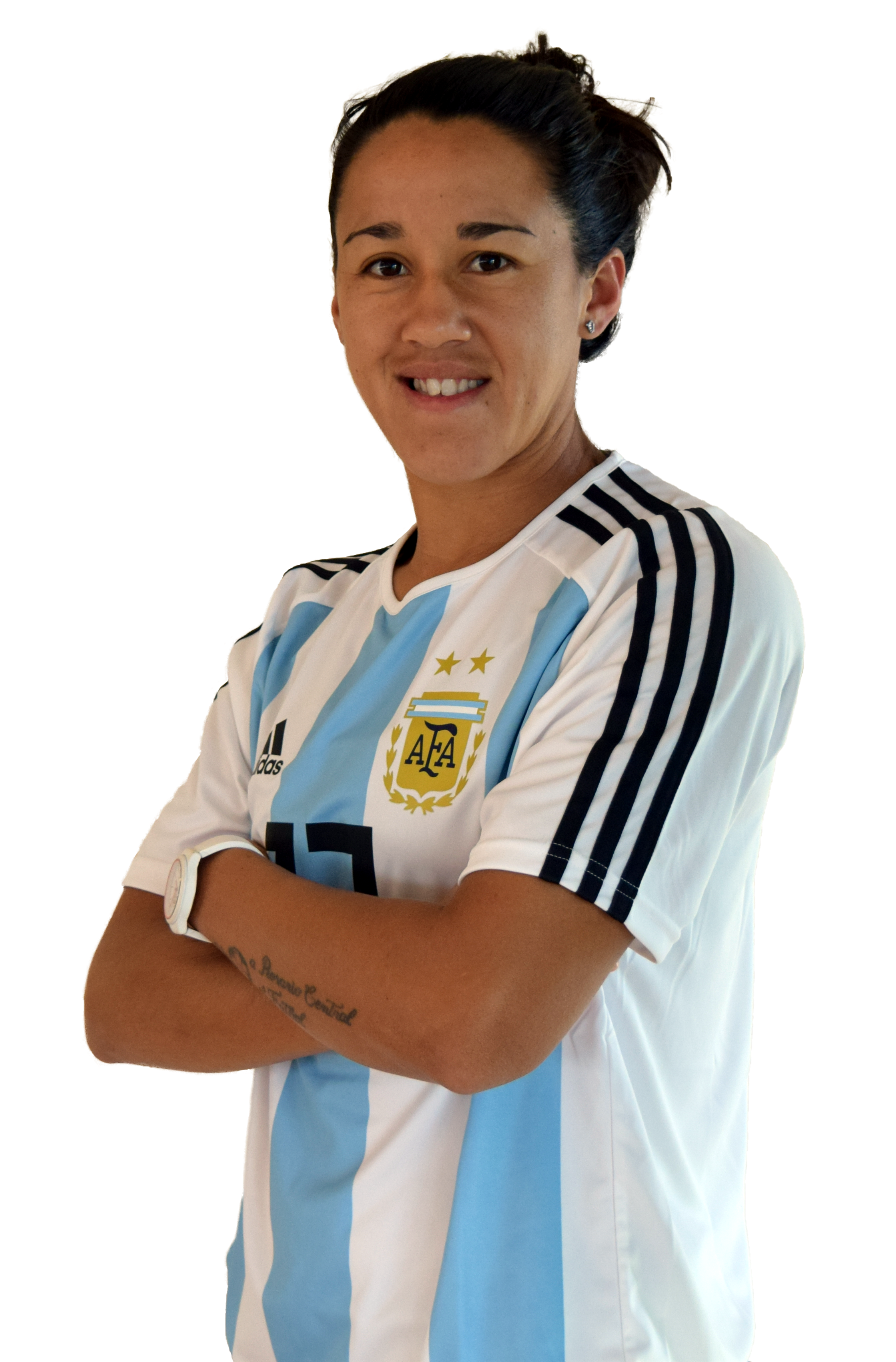 Virginia Gómez, jugadora de la selección mayor femenina de fútbol de Argentina.Foto sacada previo al primer partido del repechaje por un lugar para el mundial de futbol femenino de Francia 2019